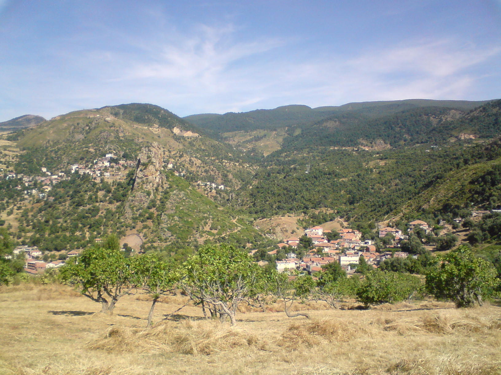 Assif El Hammam, village d'Adekar en Kabylie (Wilaya Béjaïa, Algérie).